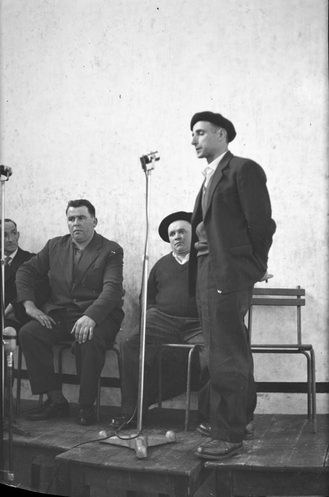 Gaia: Xalbador bertsolaria Saran ospatu zen ekitaldi batean. Atzealdean, eserita, Mattin eta Joxe Joakin Mitxelena bertsolariak. Oharra: Positiboan, atzealdean, egilearen eskuz idatzia: "Fernando Aire ´Xalbador´ Bertsolari egunean, Sarako pilotalekua (Lapurdi), 1960ko maiatza. Argazkia: Juan San Martin. Título formal en euskera VOLUMEN Y SOPORTE: 2 fotografías